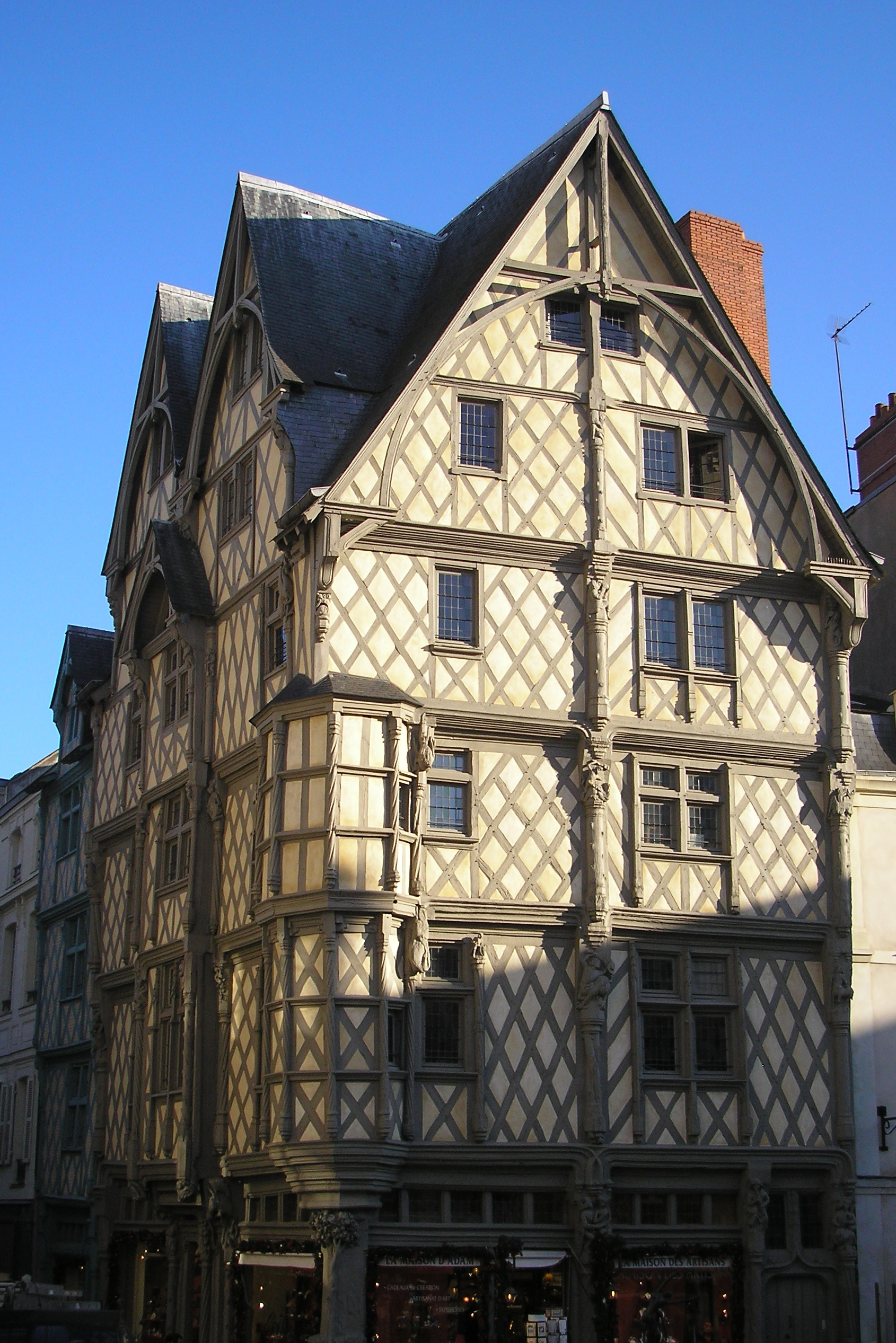 Angers (Pays de Loire, France). La maison d'Adam.